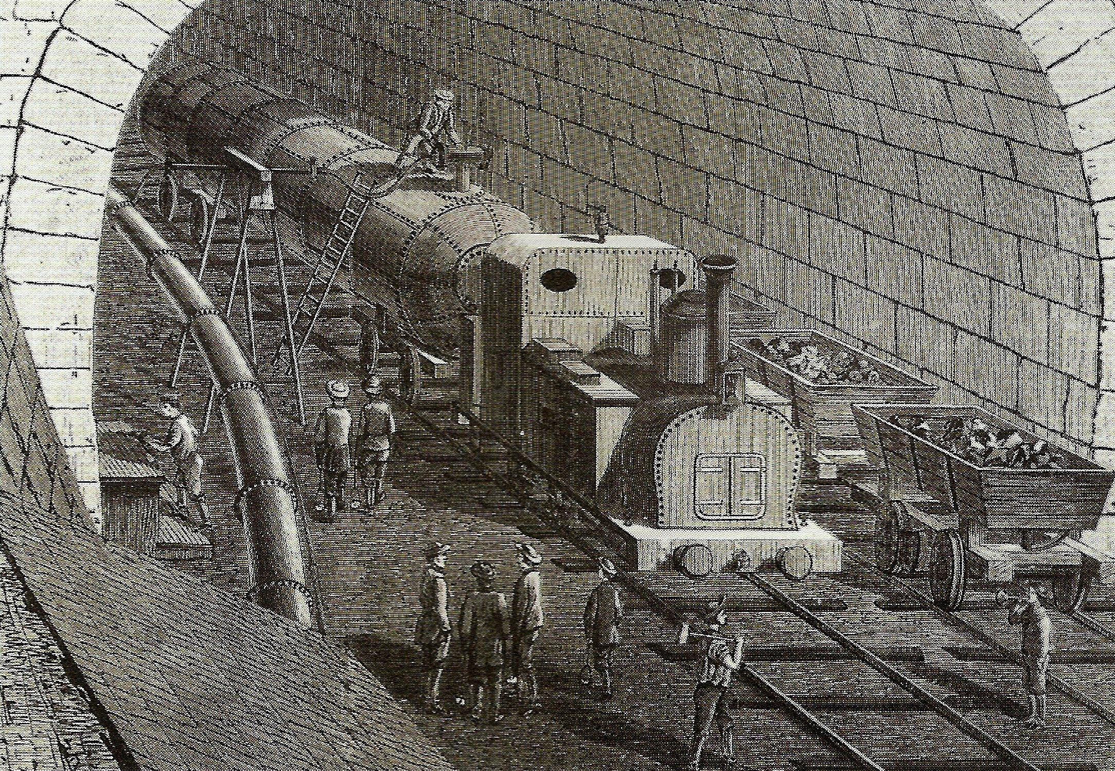 Gotthardbahn: Zeitgenössische Darstellung, eine Arbeitslokomotive wird mit komprimierter Luft gespeist.